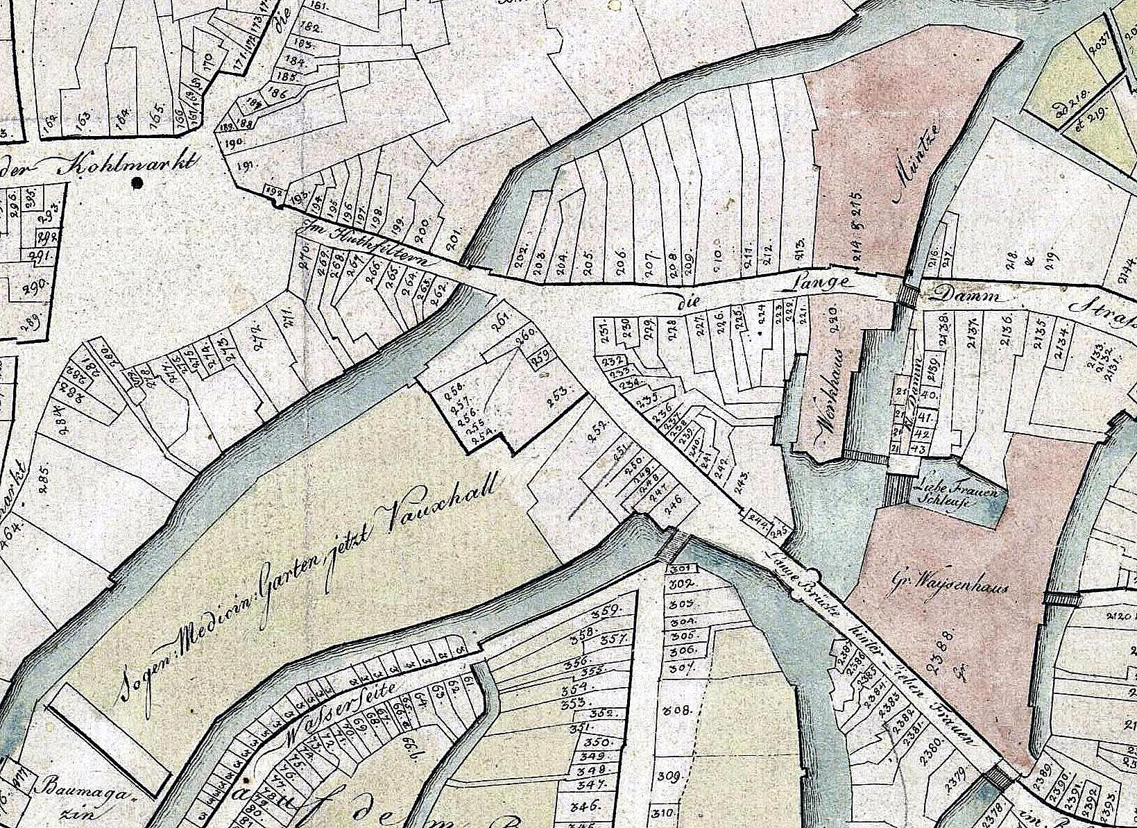 Ausschnitt aus (Hutfiltern und Umgebing) Stadtplan von Braunschweig von Friedrich Wilhelm Culemann aus dem Jahre 1798. Signatur des Stadtarchivs Braunschweig: H XI 5 18